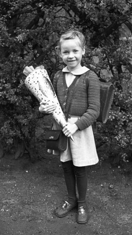 Schulanfänger, Urdenbach, 3. April 1953